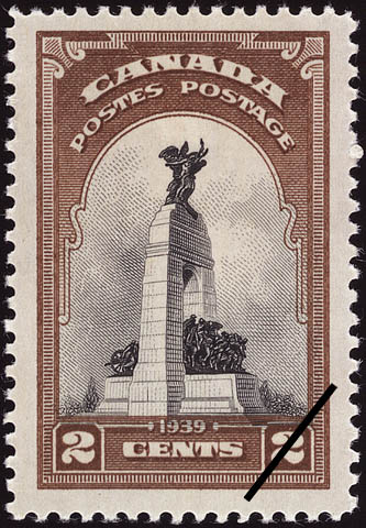 Timbre Poste Canada 2 cents Monument Grande Guerre 1939